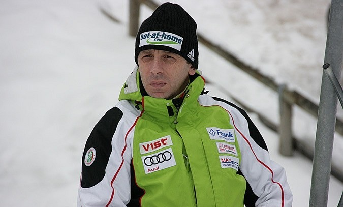 Emil Zografski podczas konkursu indywidualnego mężczyzn na skoczni normalnej w ramach Mistrzostw Świata 2013.